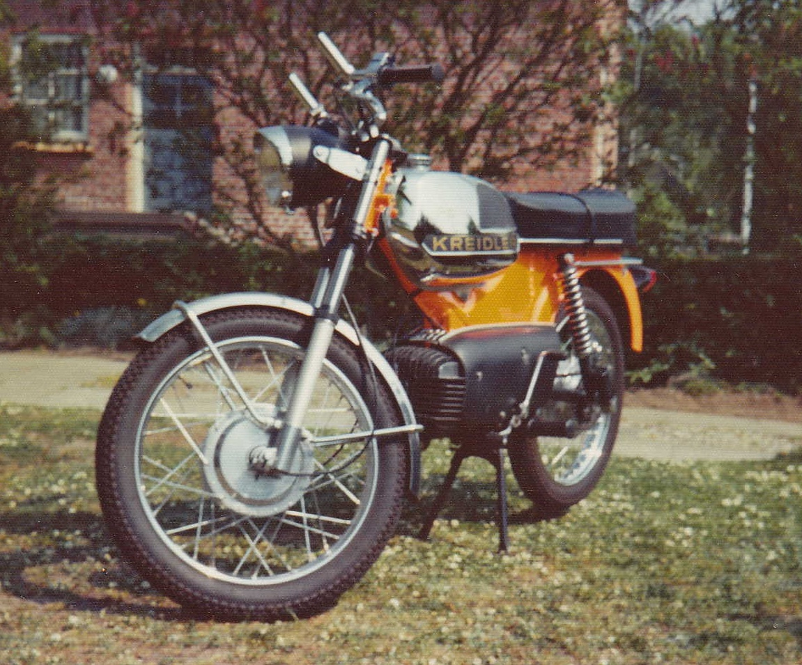 Ulovlig - 120kmt, 5 gear